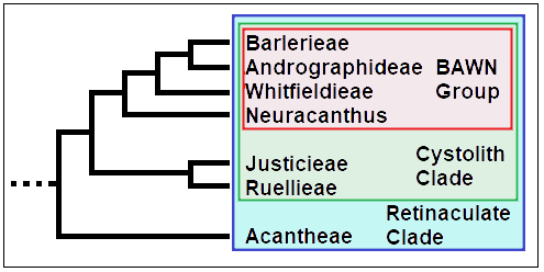 Cladogramma_della_sottofamiglia Acanthoideae